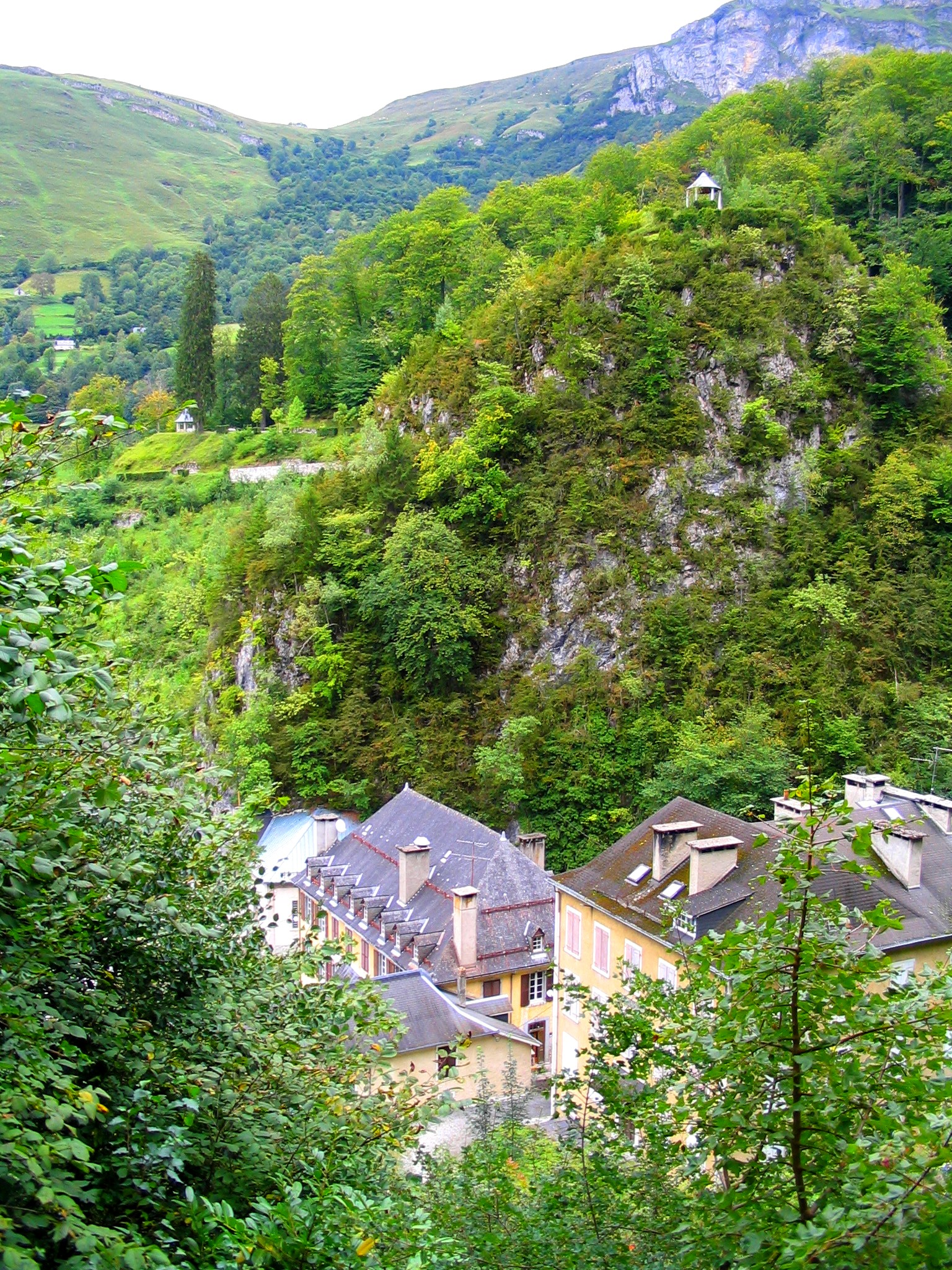 Eaux-Bonnes, Pyrénées Atlantiques, France